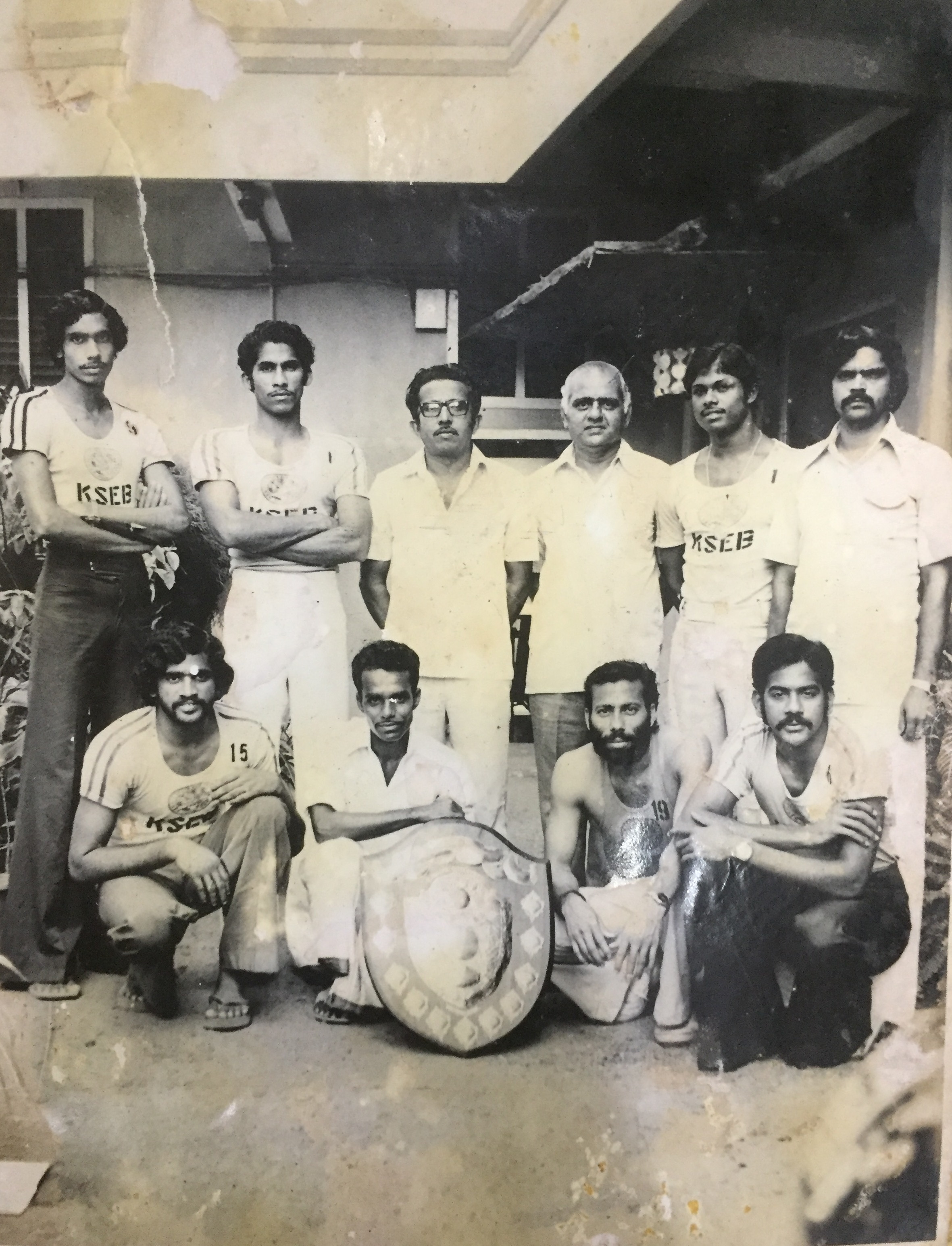 കെഎസ്ഇബി ടീമിനൊപ്പം